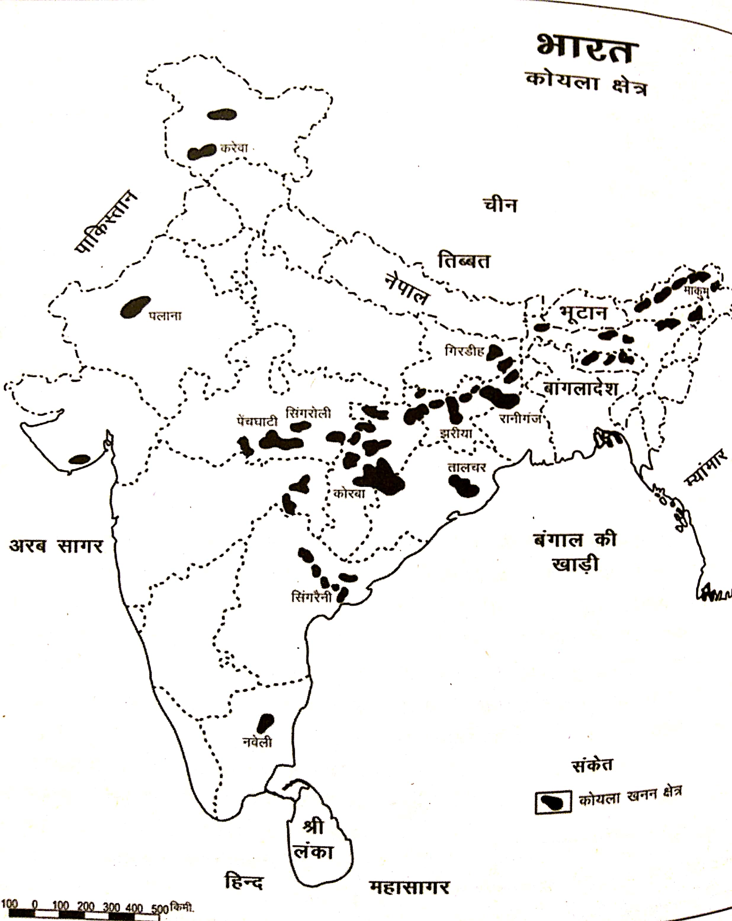 भारत कोयला क्षेत्र